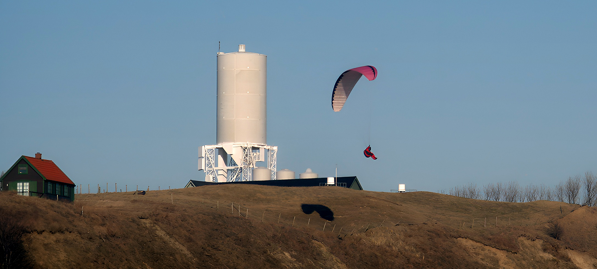 FRA Försvarets Radio Anstalt. Torn för signalspaning i Kåseberga.